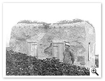 Husha in Um Juni Degania Alef חושה באום ג'וני, שבה הוקמה דגניה א', לידה יוסף ברץ, צולם לפני 1914